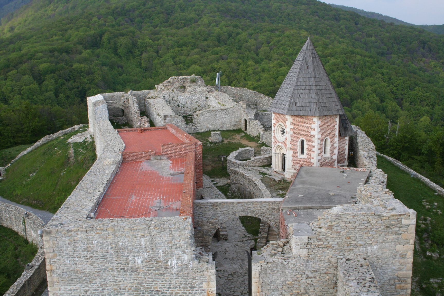 Medvedgrad 2014